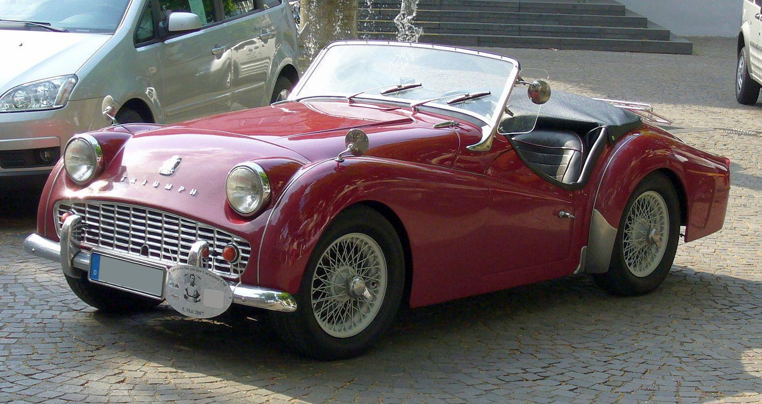 Triumph TR3